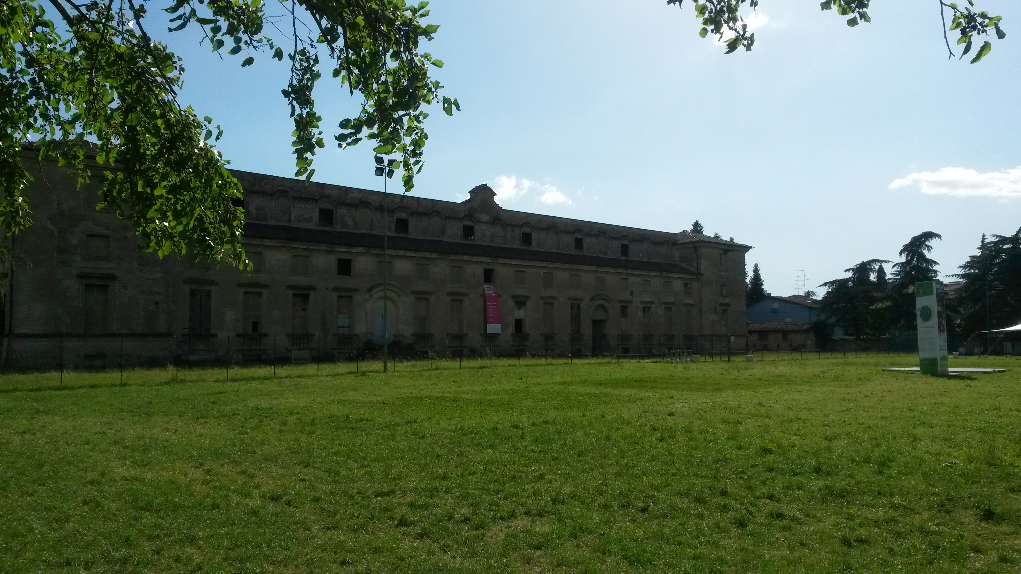 Reggia di Rivalta This is a photo of a monument which is part of cultural heritage of Italy.